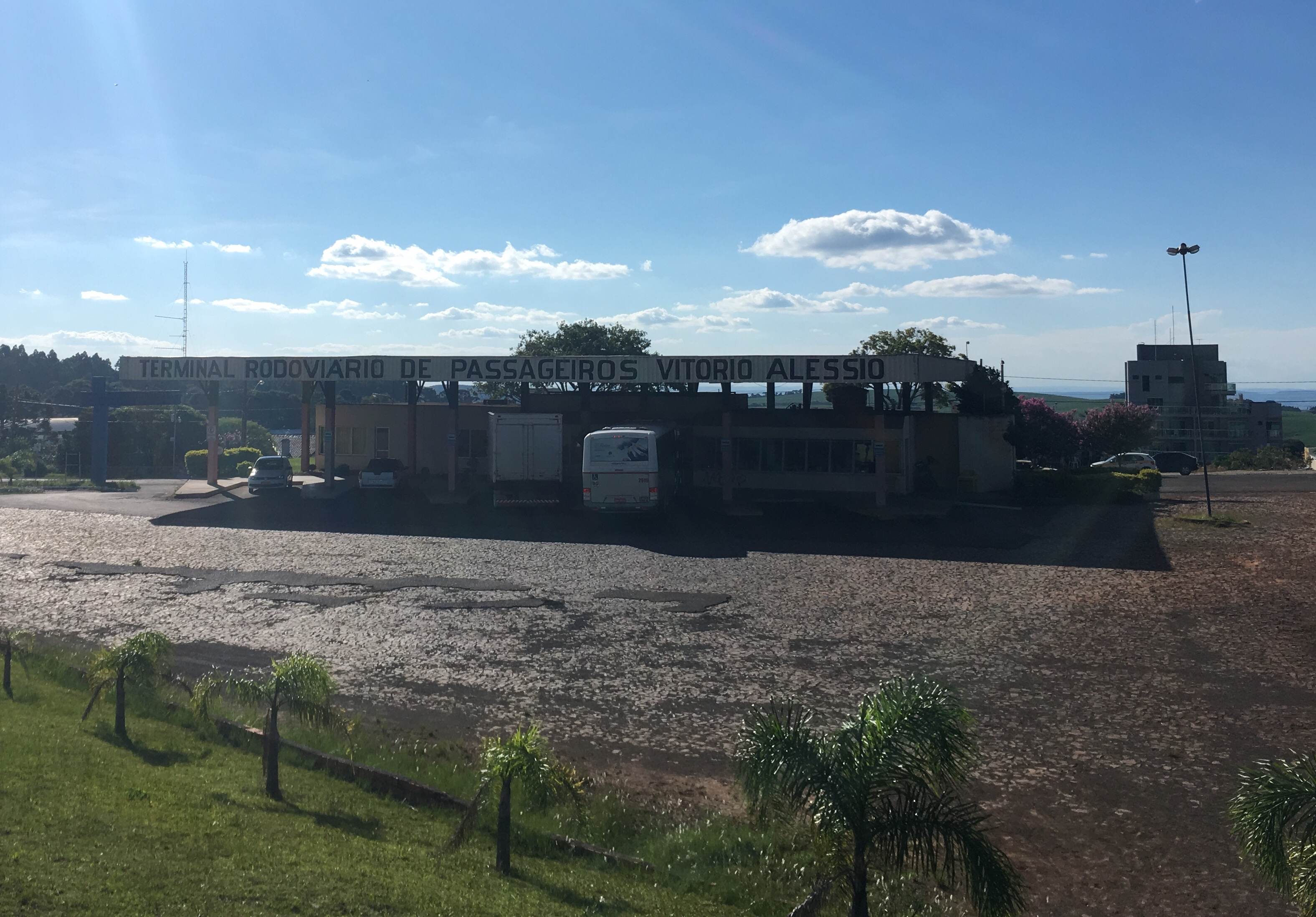 Rodoviária Vitório Alessio